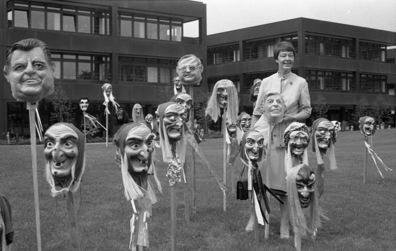 Frau Hannelore Schmidt besichtigt die Aufbauten für das Kanzler-Sommerfest im Palais Schaumburg und im Park.